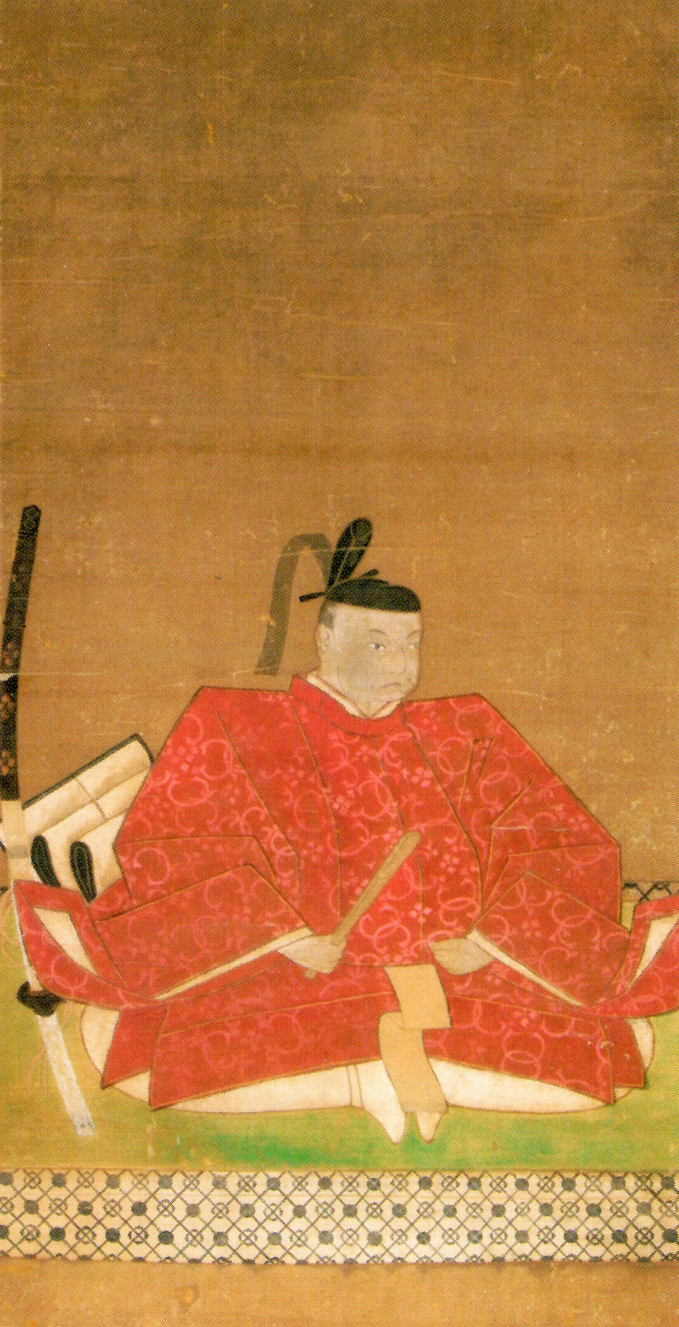 本多政質の肖像。